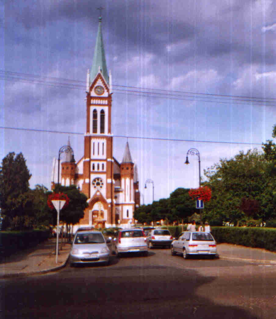 Budapest XX. district